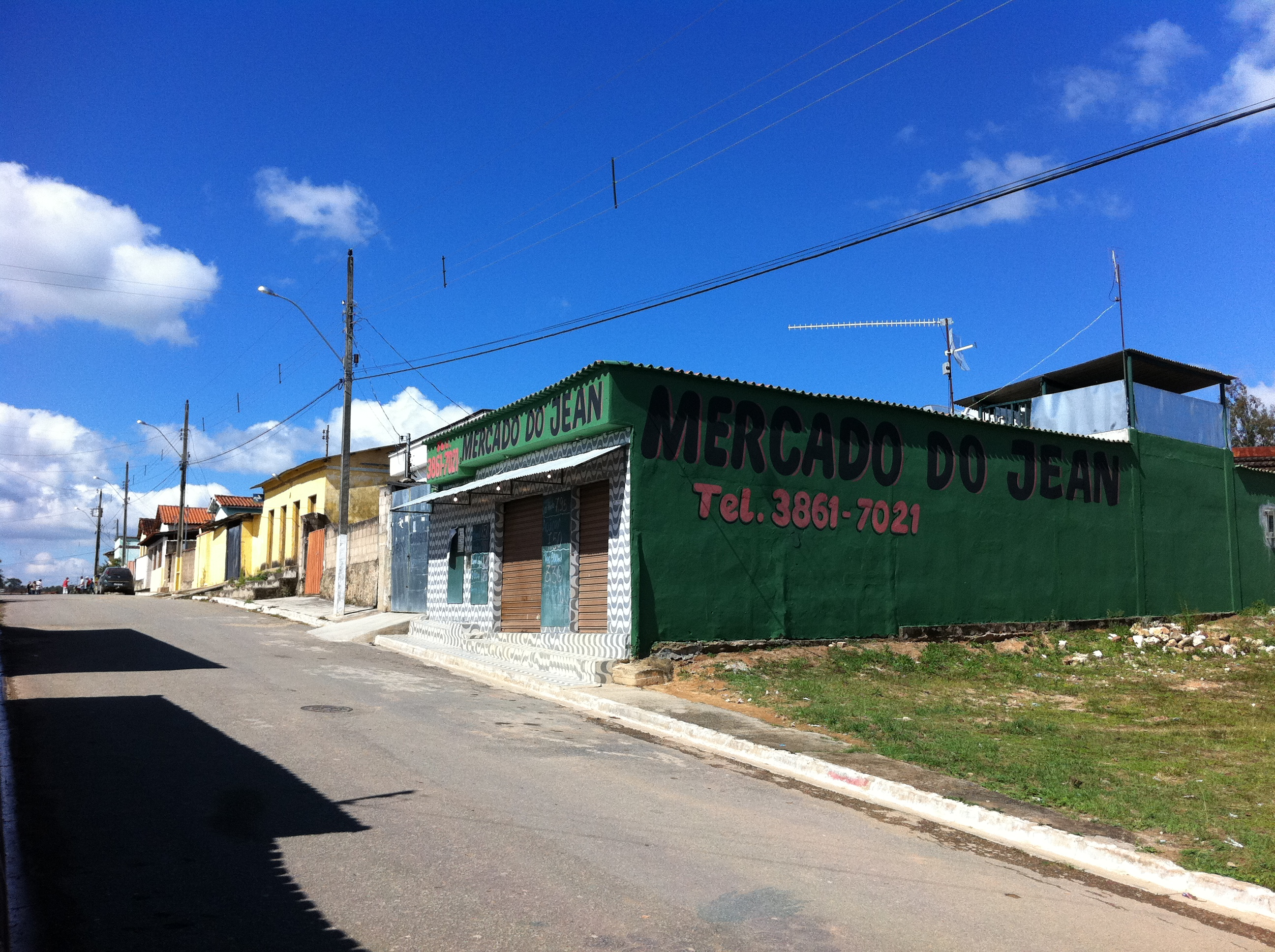 Comércio Local em Nazaré de Minas